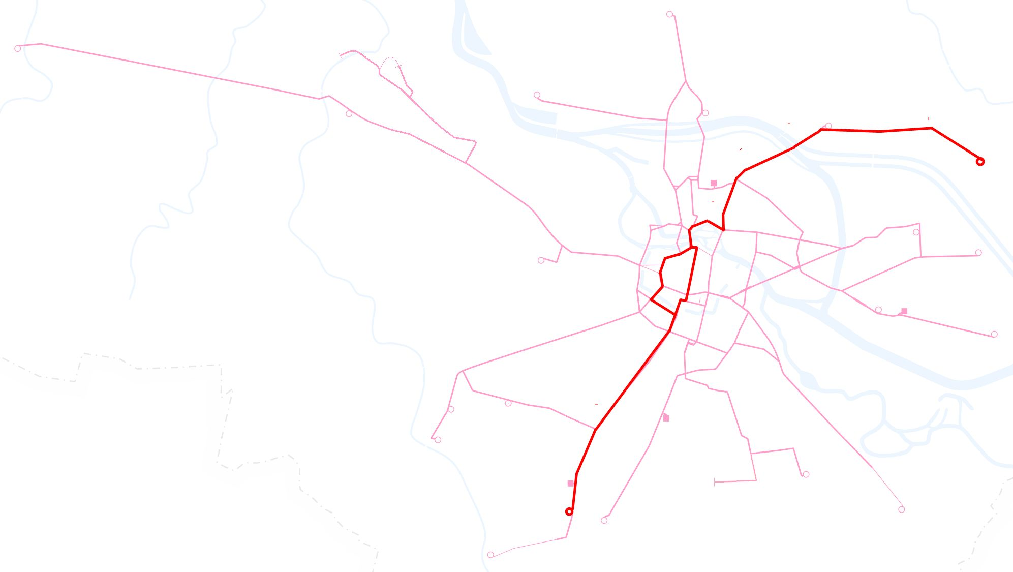 Poglądowa mapka przebiegu linii tramwajowej 6 we Wrocławiu.